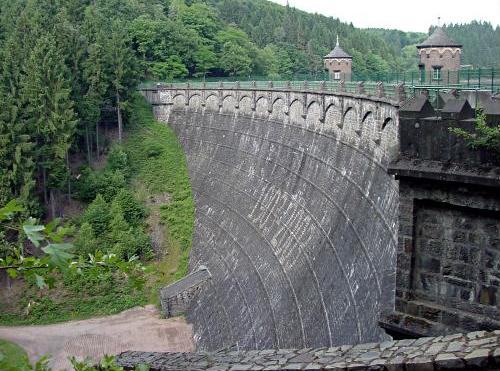 Sperrmauer der Sengbachtalsperre - Luftseite